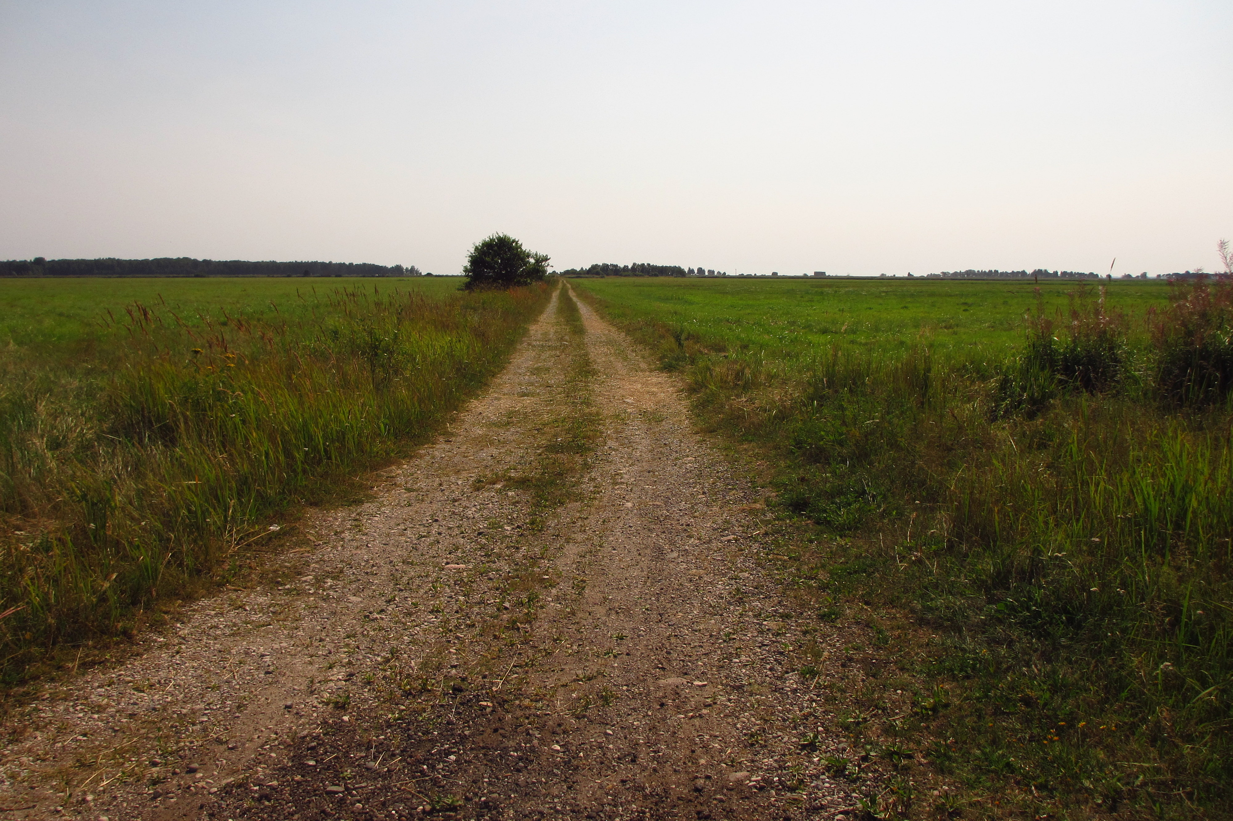 Vaade üle Audru poldri